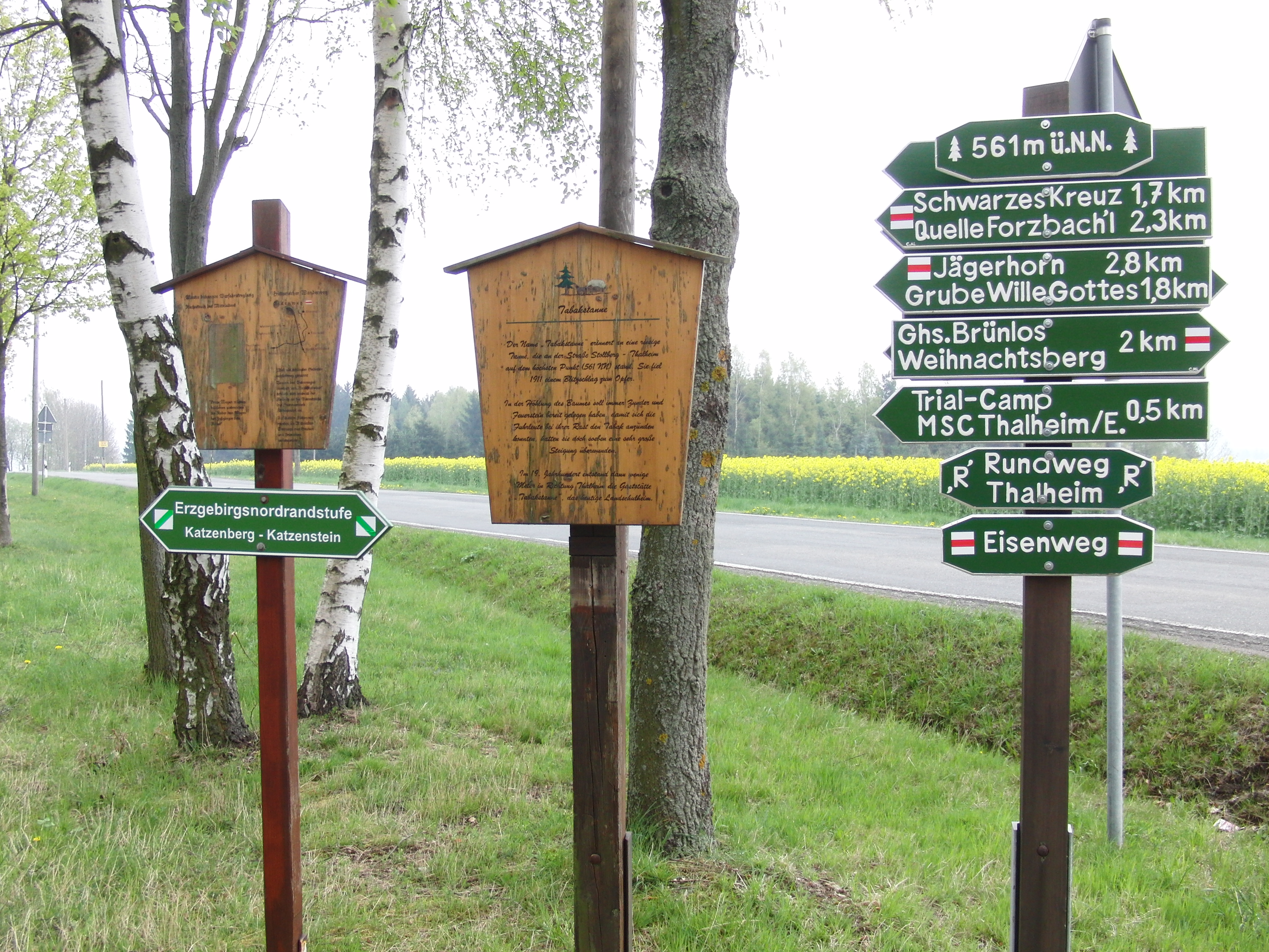 Entlang des Thalheimer Rundweges. Wegweiser an der Tabakstanne.